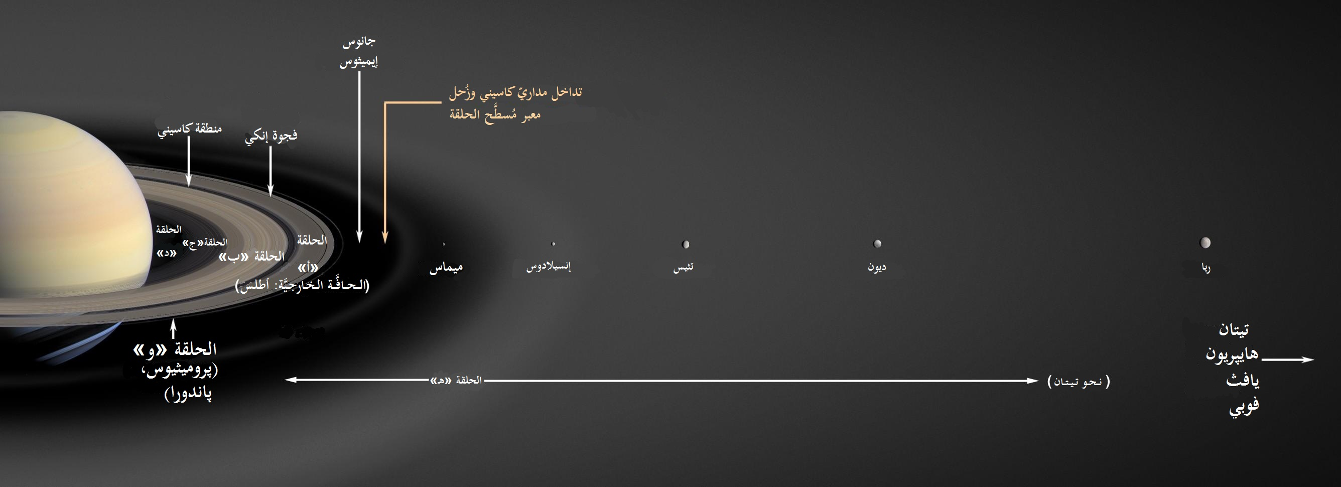 رسمٌ تخيُليّ لِحلقات كوكب زُحل وأقماره الجليديَّة الرئيسيَّة.